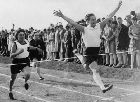 Erika Wex als Siegerin in einem Wettbewerb